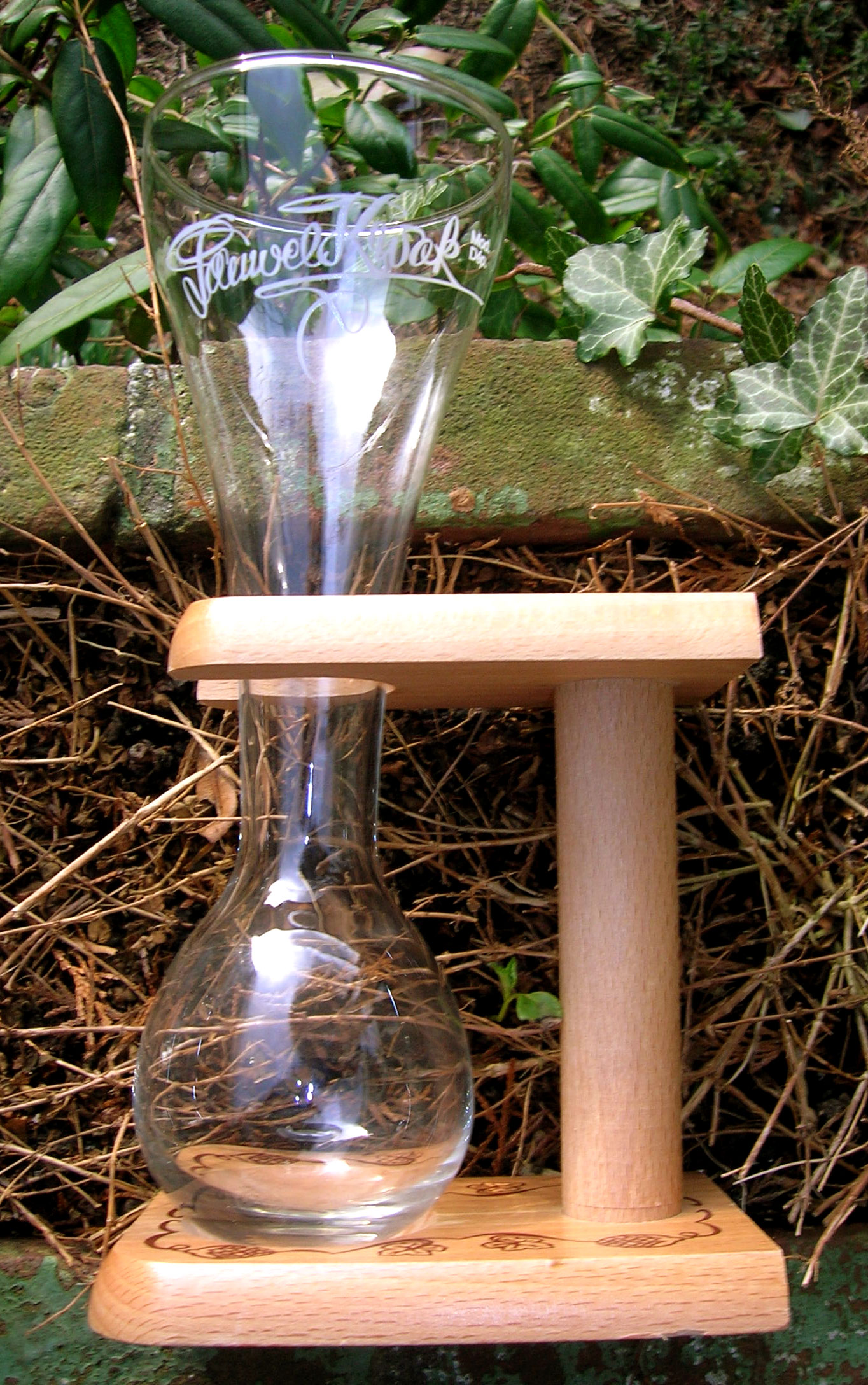 Glass of 'Pauwel Kwak' beer. 'Koetsiers'glas. Own work.